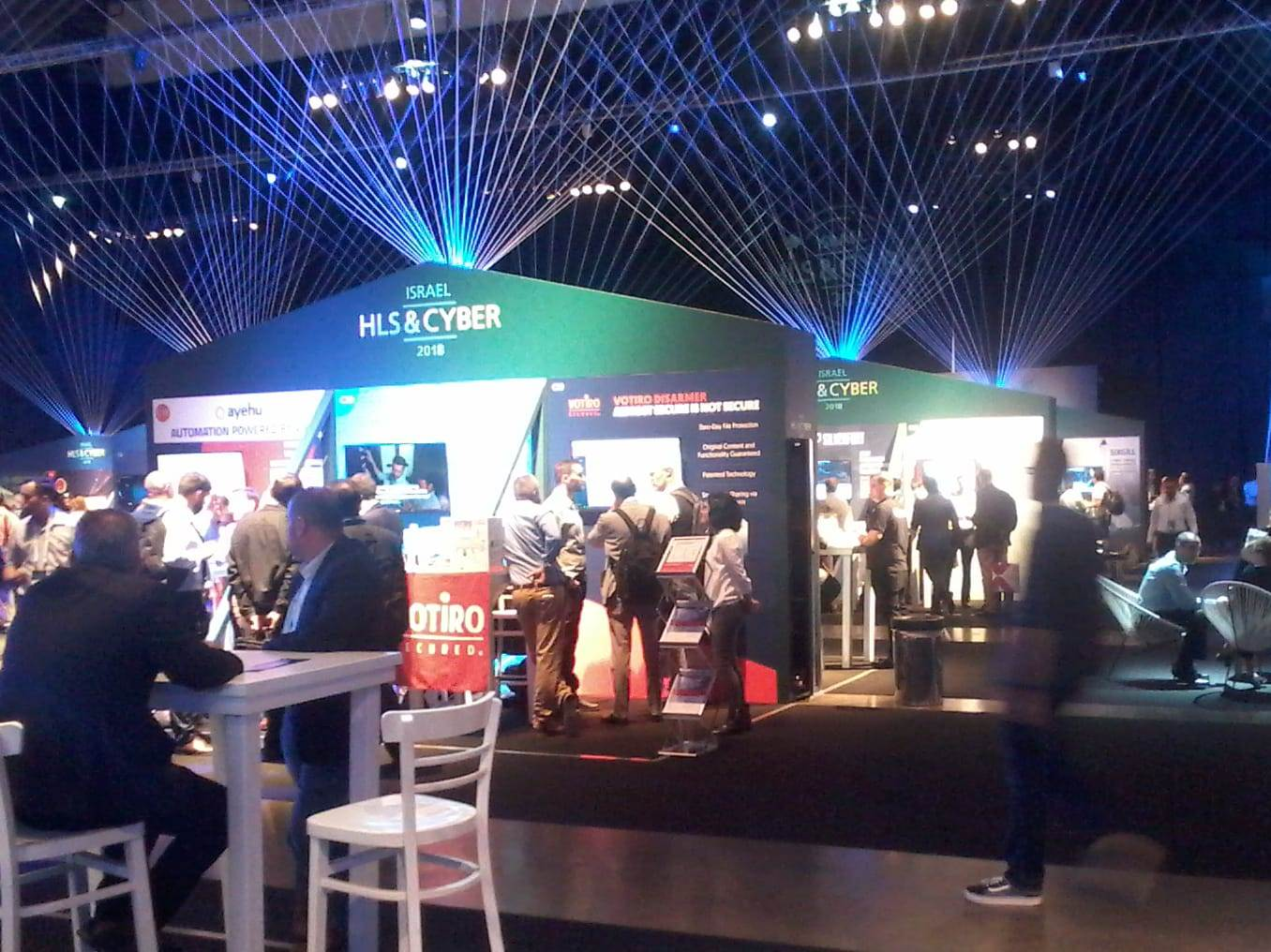 HLS כנס